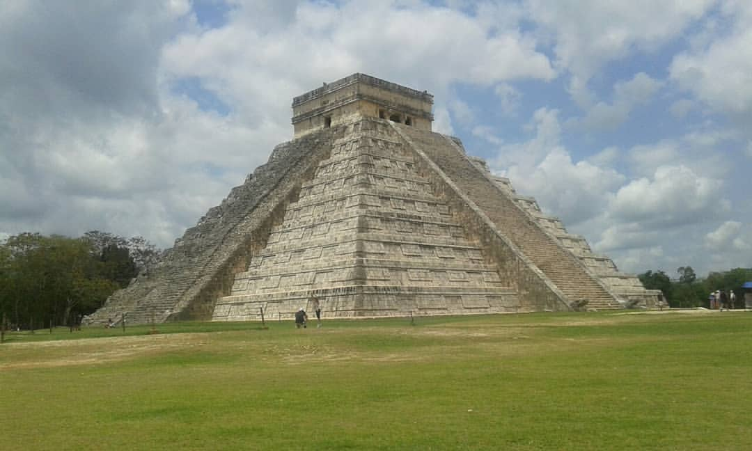 Foto del Templo de Kukulkán